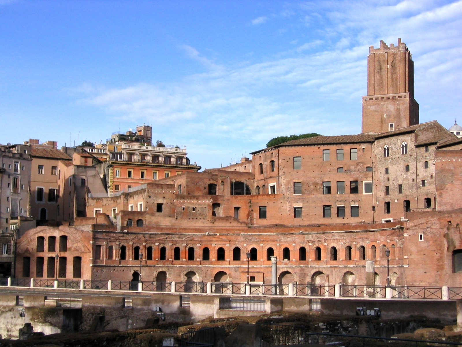 Mercati di Traiano - Roma